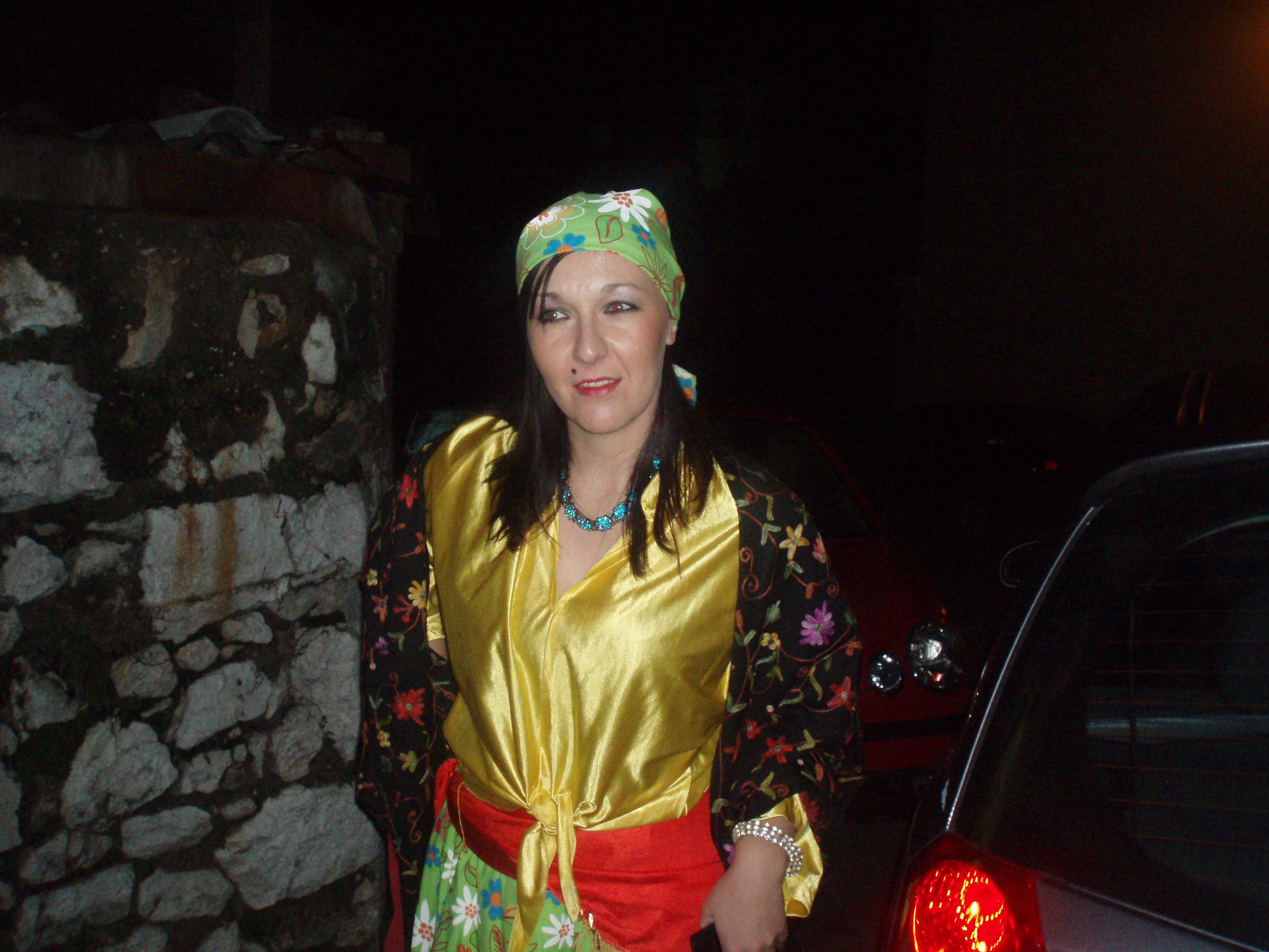 Jedna od učesnica maškara obučena u Romkinju. Rijeka 2008.